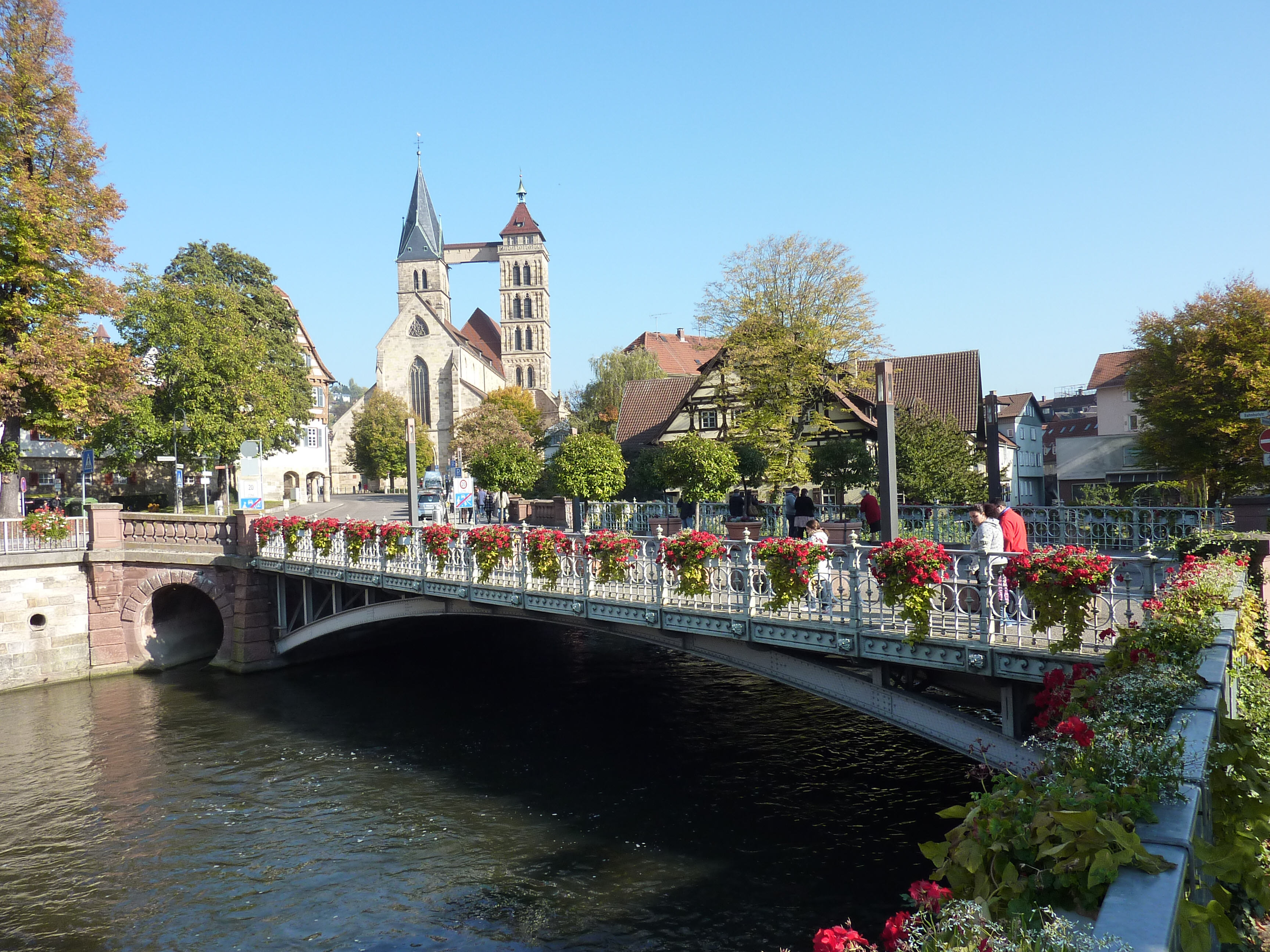 Blick vom Agnessteg auf die St.-Agnes-Brücke in Esslingen